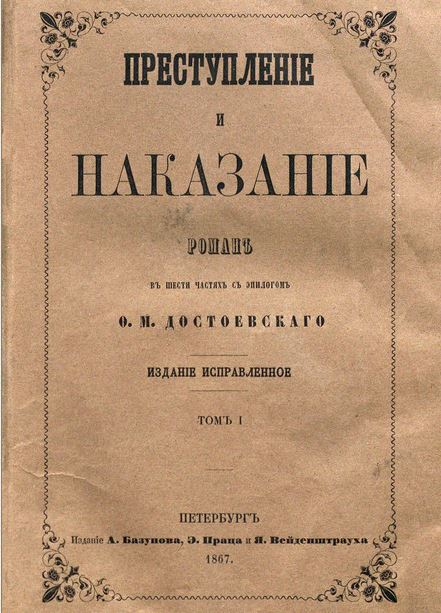 Обложка первого издания романа Ф. М. Достовского "Преступление и наказание", том 1, 1867